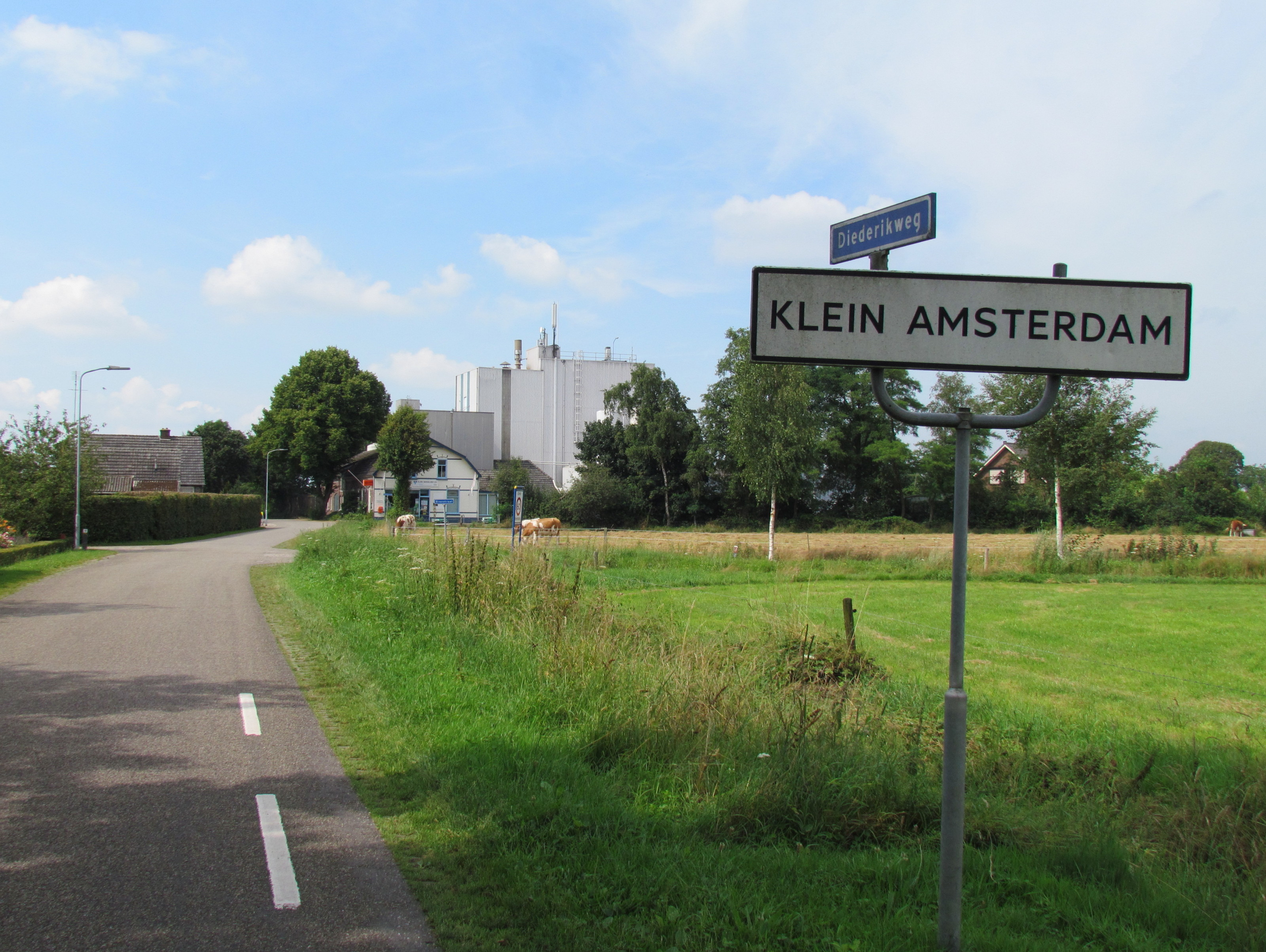 Klein Amsterdam, een buurtschap in de Nederlandse gemeente Voorst (Gelderland)